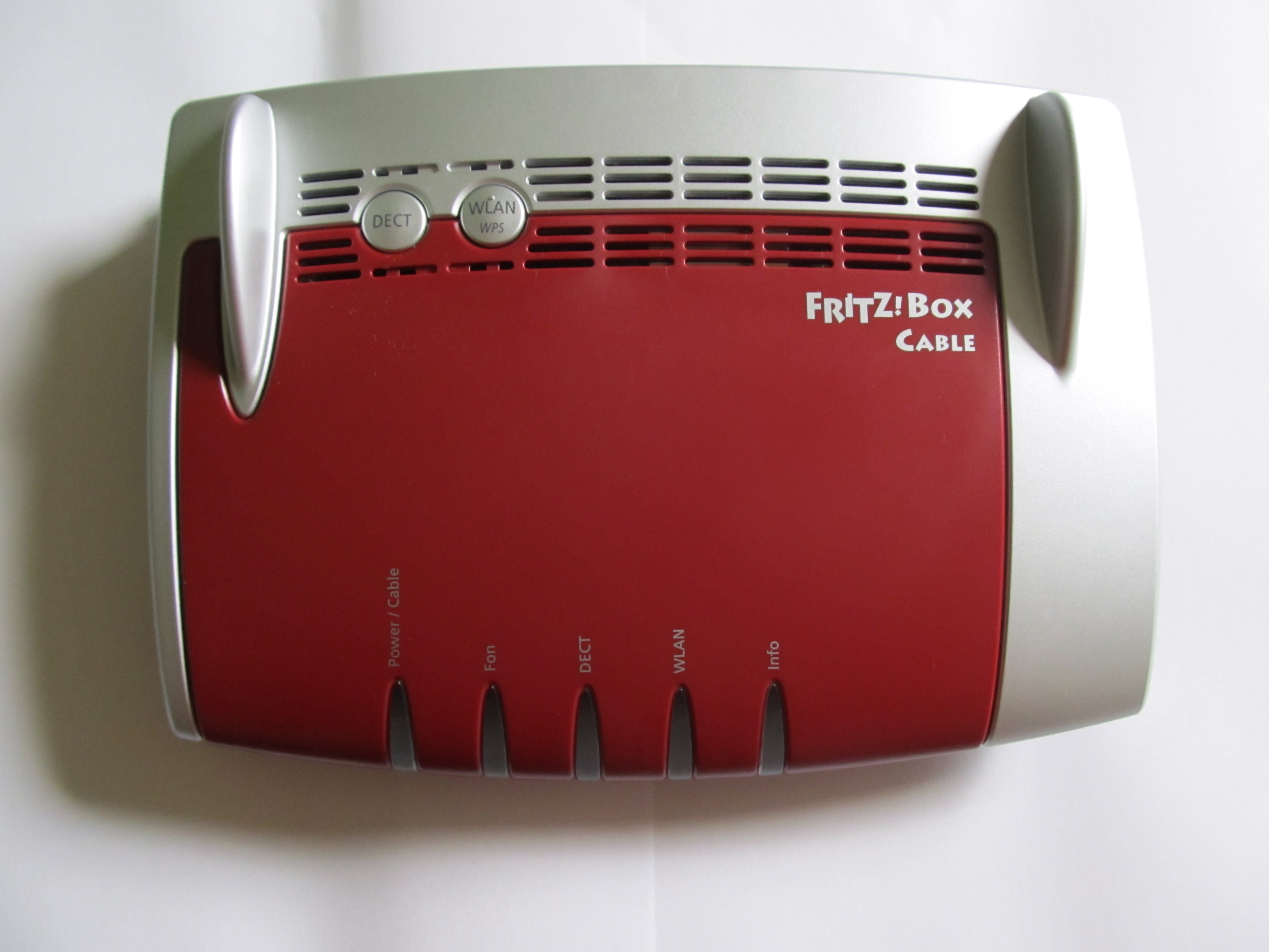 FRITZ!Box 6490 Cable für den Kabelanschluss